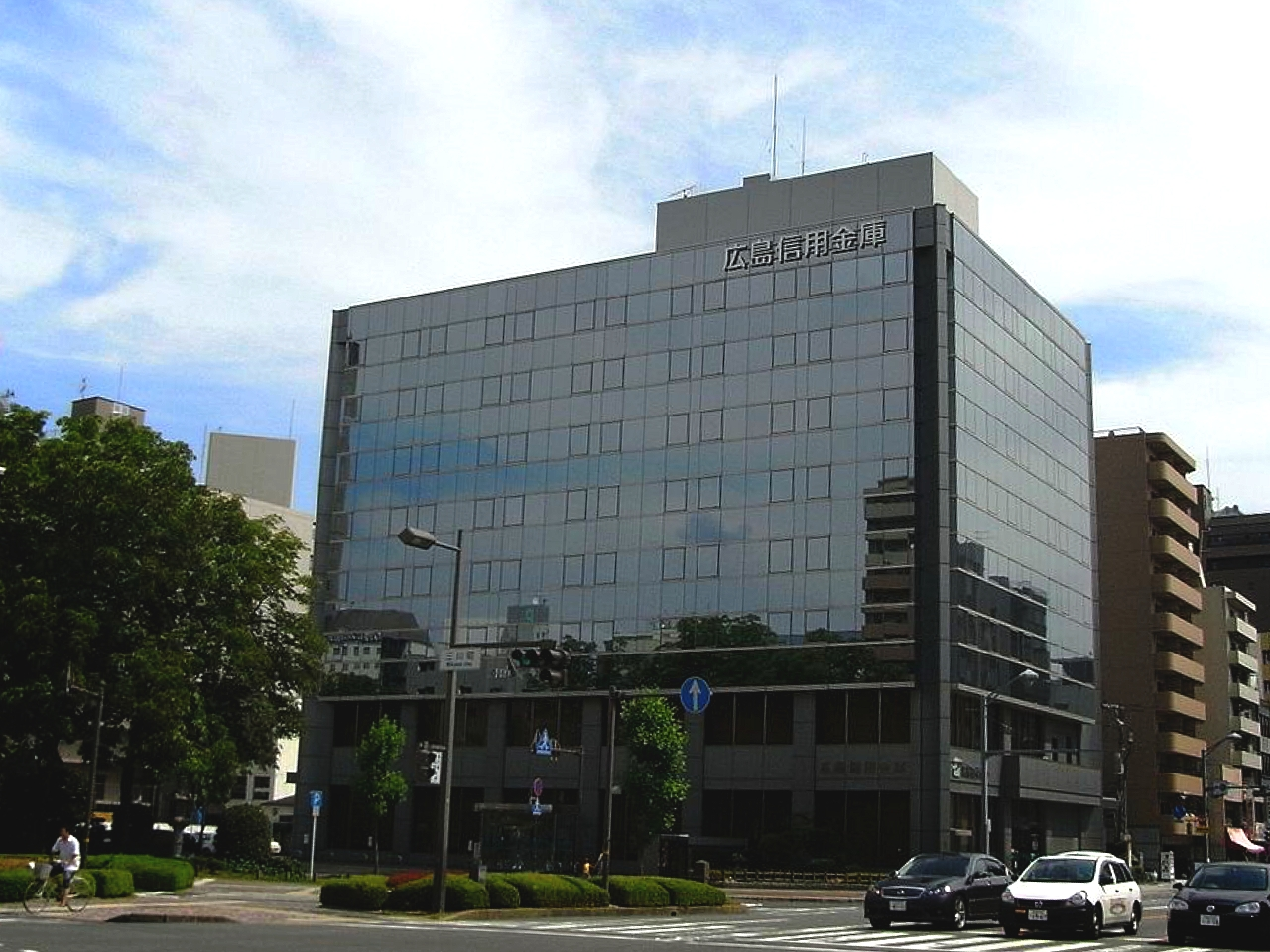 広島信用金庫 本店